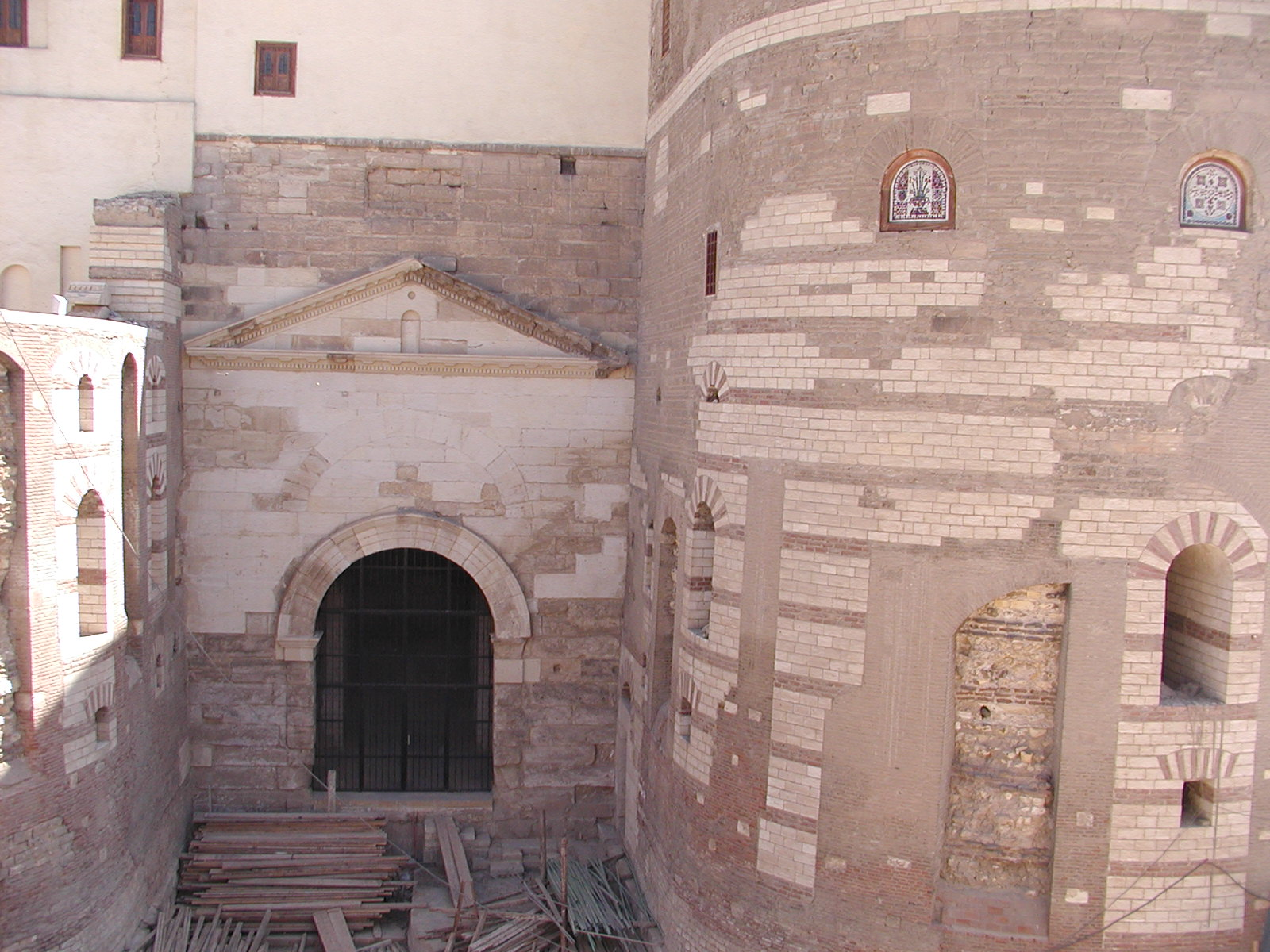 Tour de Babylone du quartier copte, (Le Caire, Égypte).